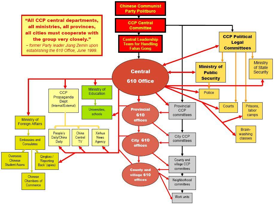 610 Office organization.